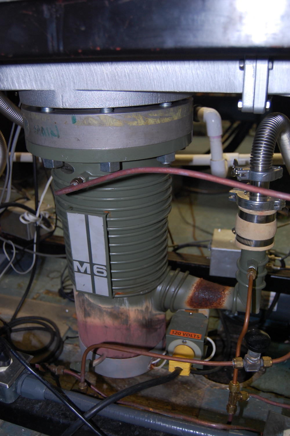 Varian M6 oil diffusion pump